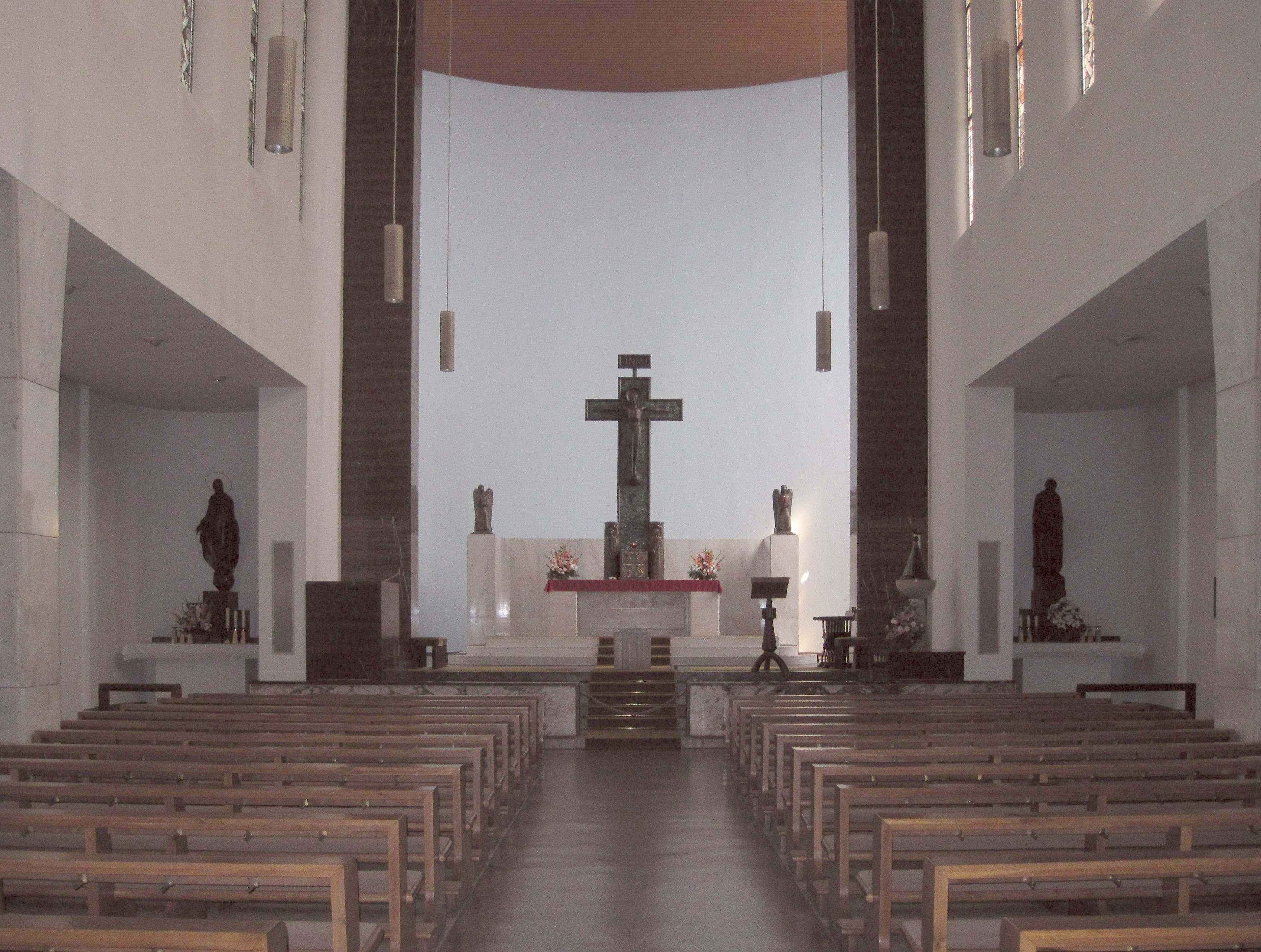 Berlin-Dahlem, kath. Kirche St. Bernhard, Inneres